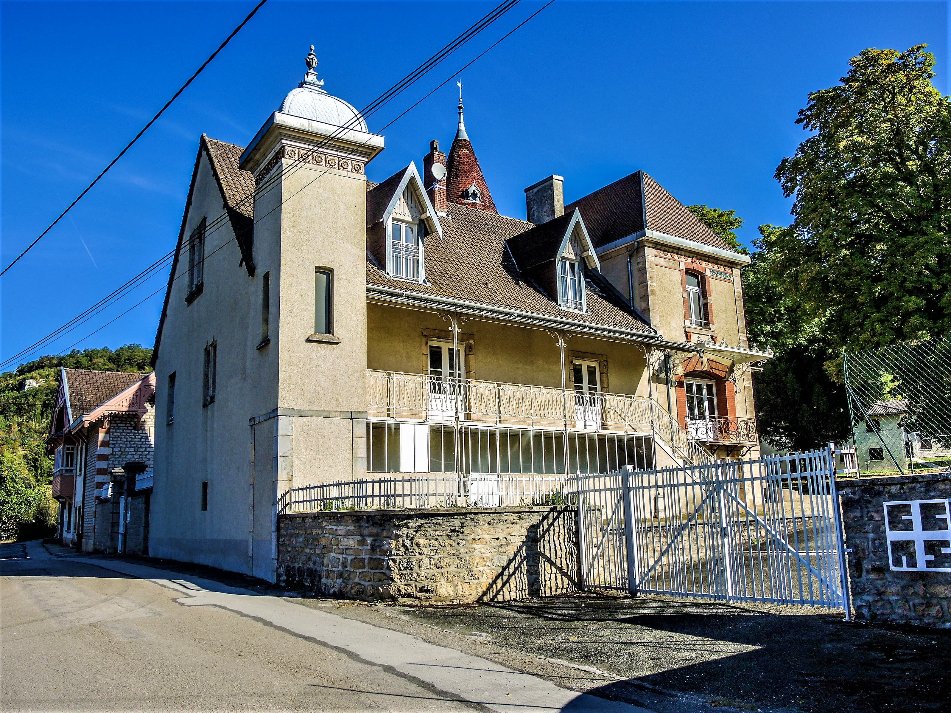 Château de Montgesoye